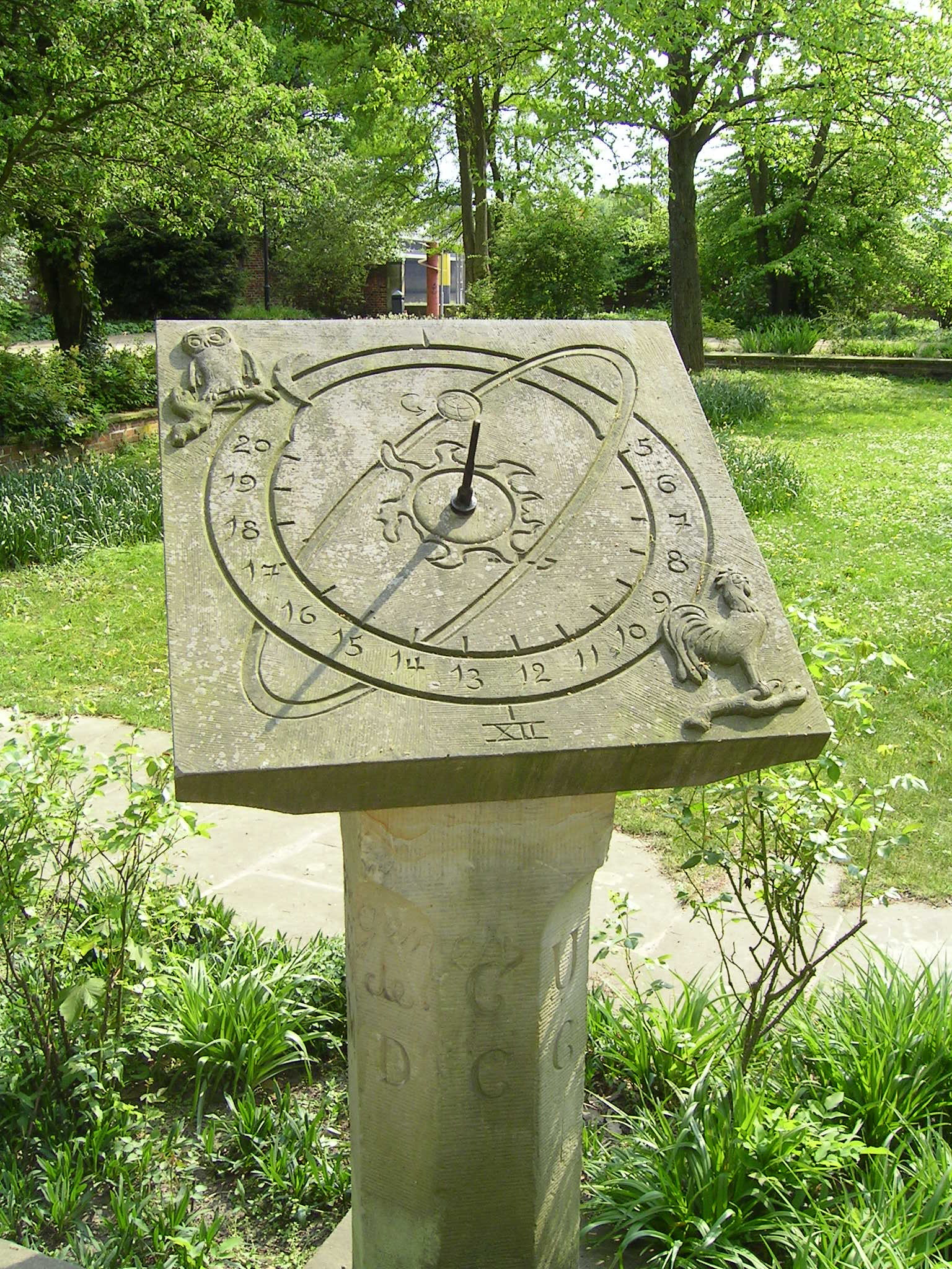 Focke Garten, Bremen